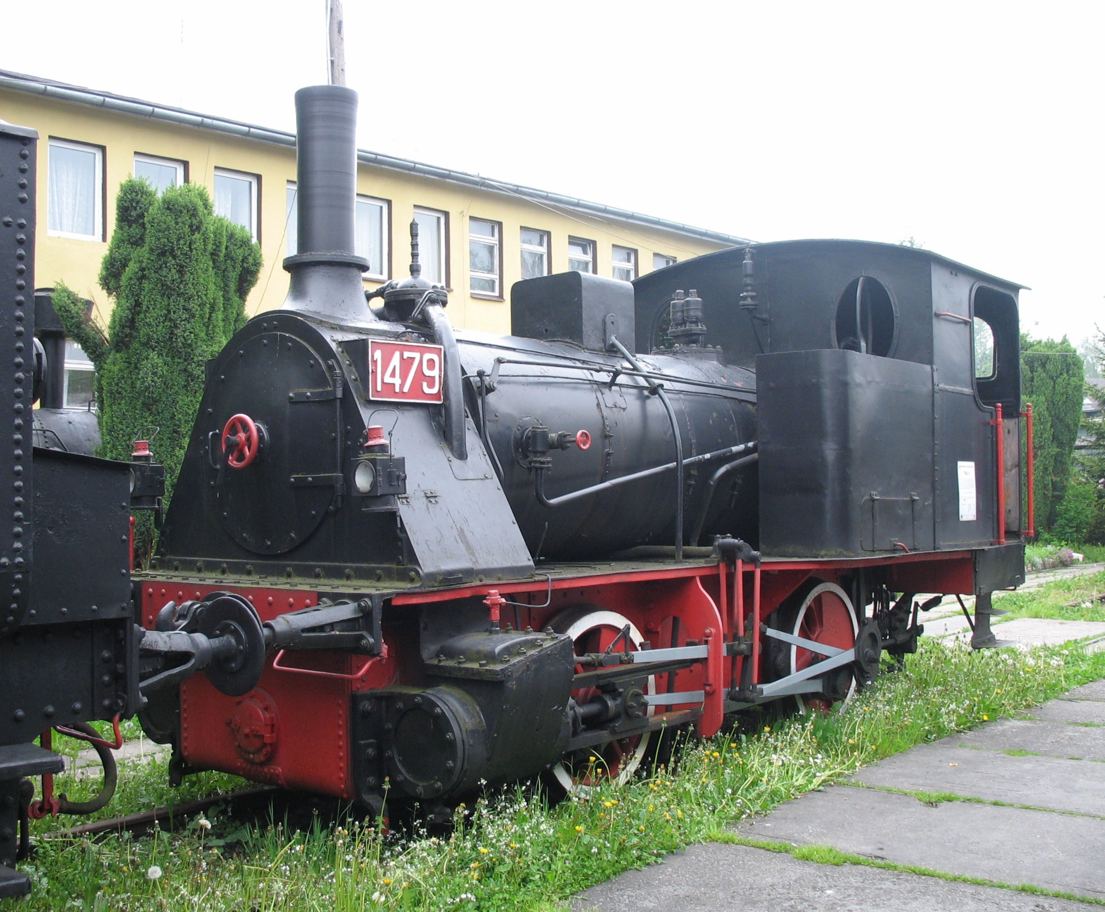 Lokomotywa parowa TKb-1479. Zbudowana w 1878 roku przez zakłady Schwartzkopff. Najstarsza zachowana w Polsce lokomotywa parowa. Eksponat Skansenu w Chabówce.